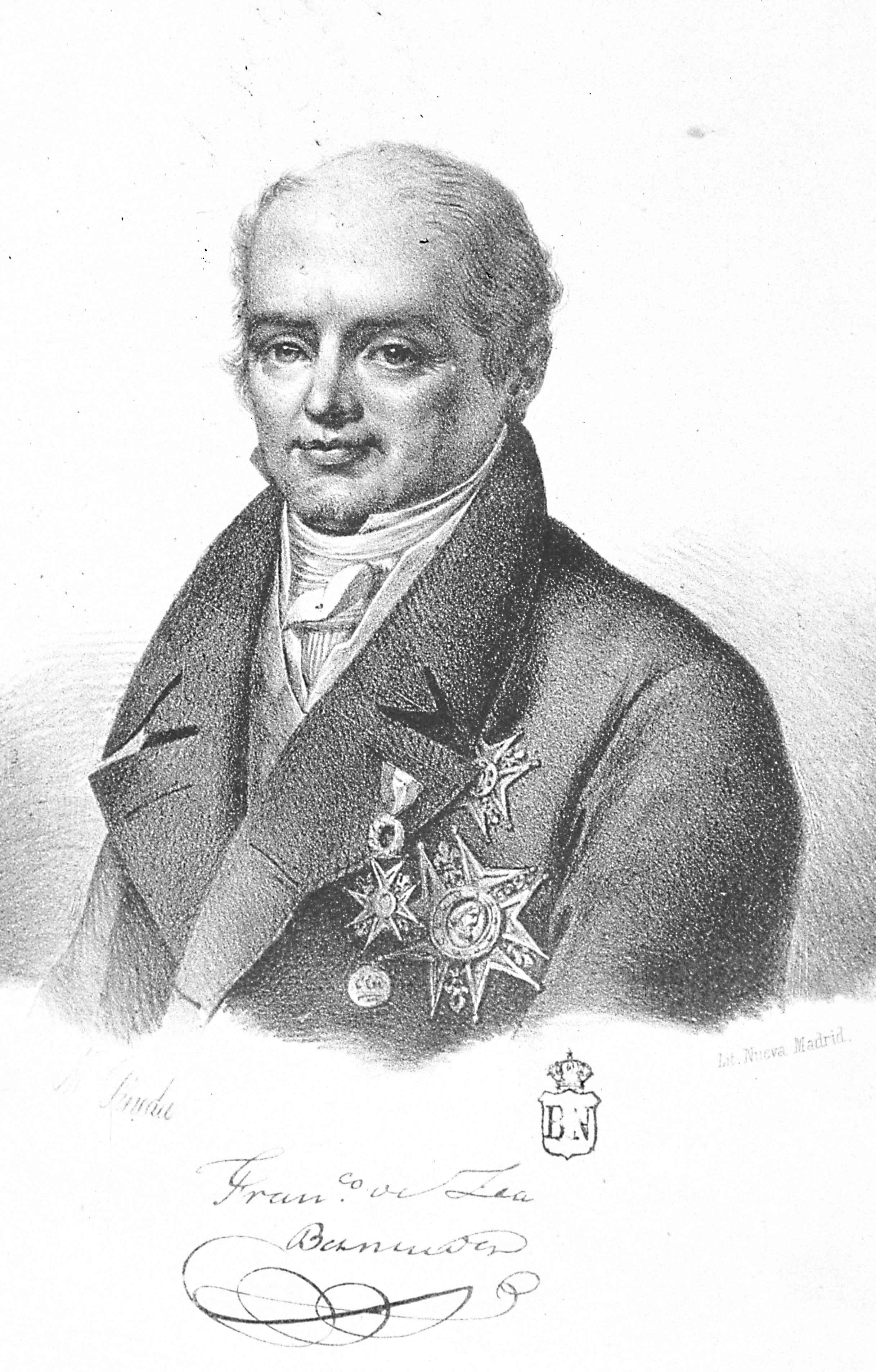 Retrato de Francisco Cea Bermúdez